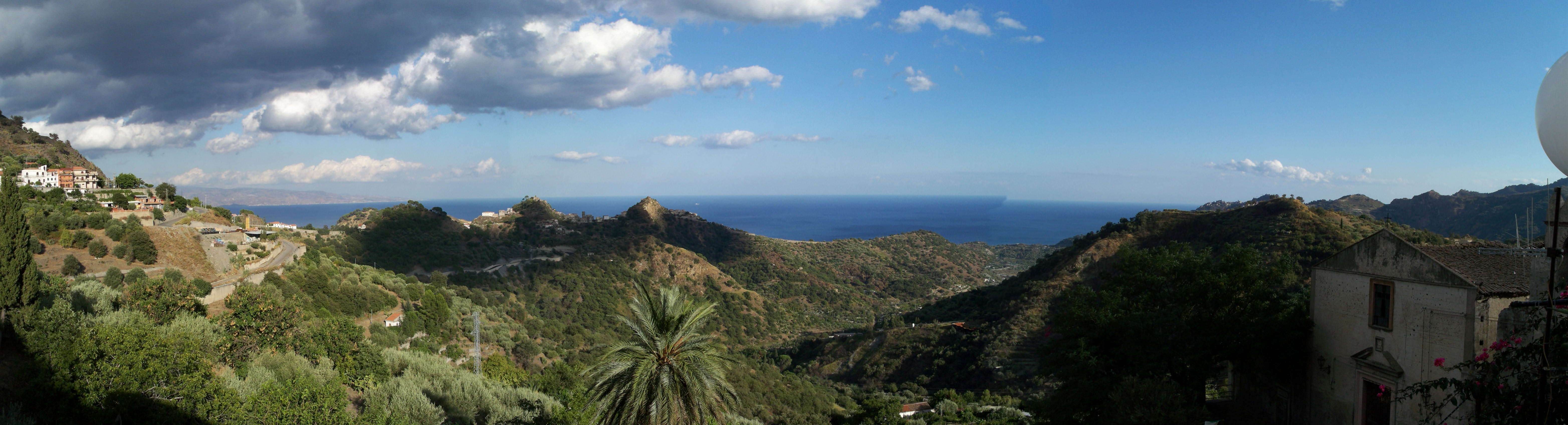 Panoramica da Casalvecchio Siculo